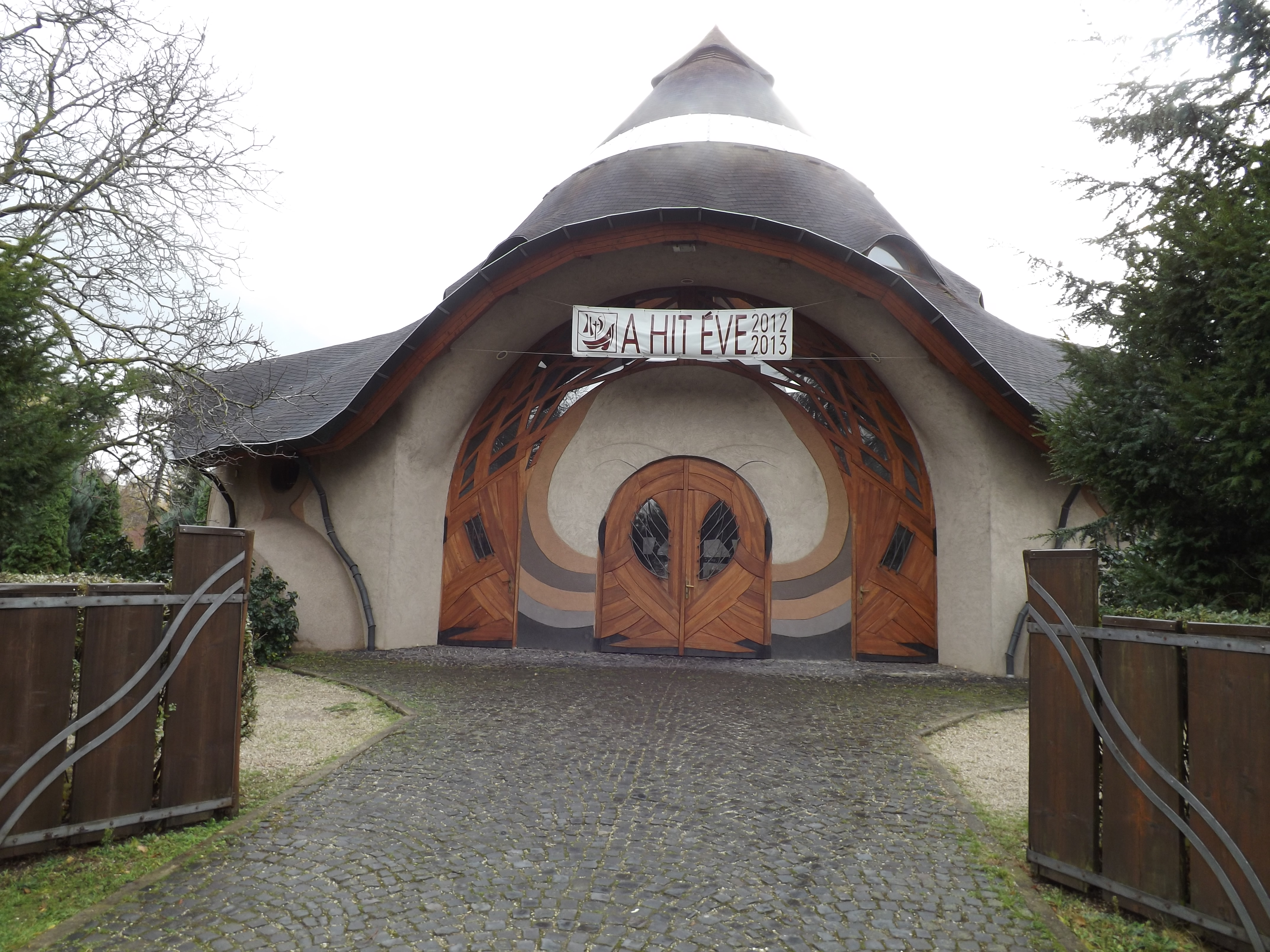 Debrecen, Tócoskerti katolikus templom bejárata